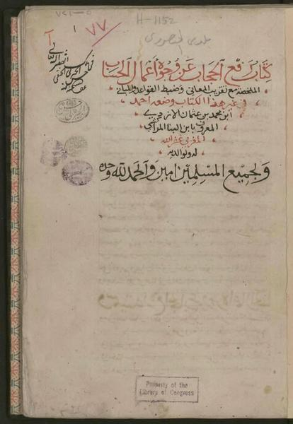 La levée du voile sur les opérations de calcul, Ibn al-Bannāʼ, Aḥmad ibn Muḥammad (1256 ?-1321 ?)